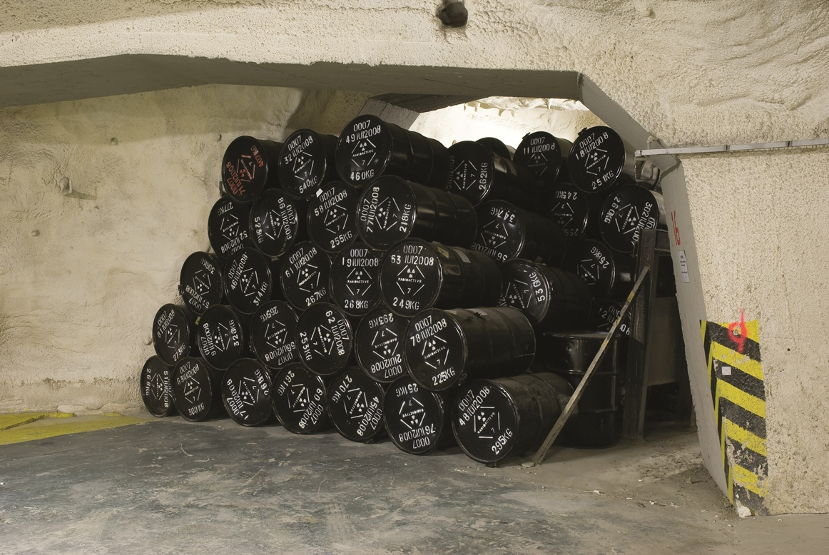 Uložené obalové soubory s radioaktivním odpadem v úložišti Richard